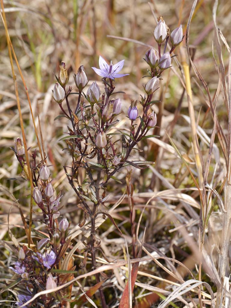 Swertia pseudochinensis：ムラサキセンブリ 2016/11/13 生石山（和歌山県）：Mount Oisi(Wakayama Pref,)